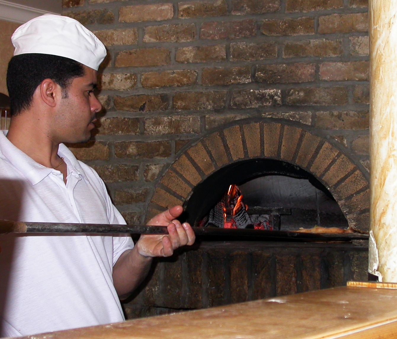 Een pizza in de oven bij de Italiaan; (en) A pizza in the oven of an Italian restaurant